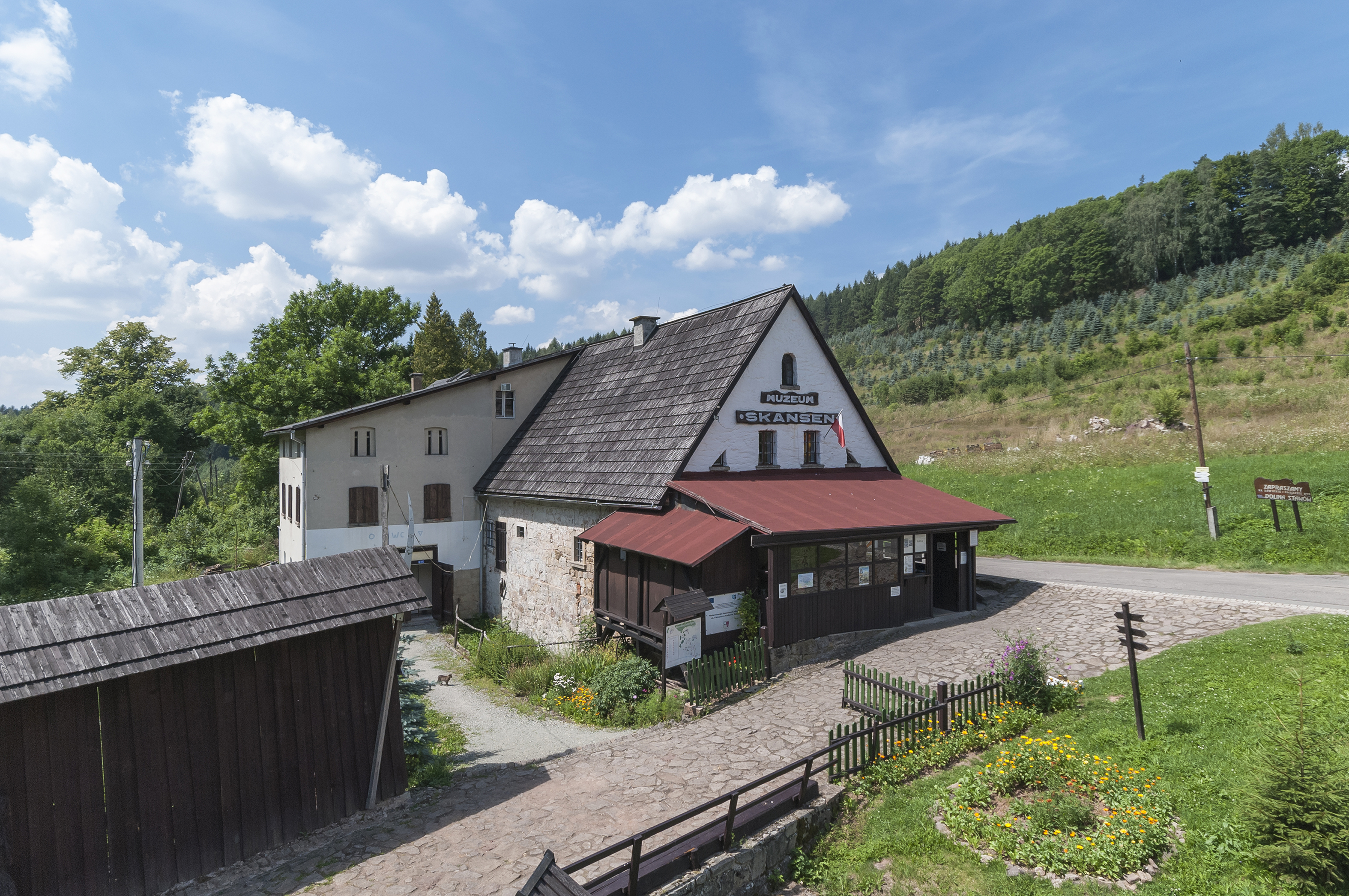 Kudowa-Zdrój - Pstrążna, wieś - układ przestrzenny, XVIII, XX